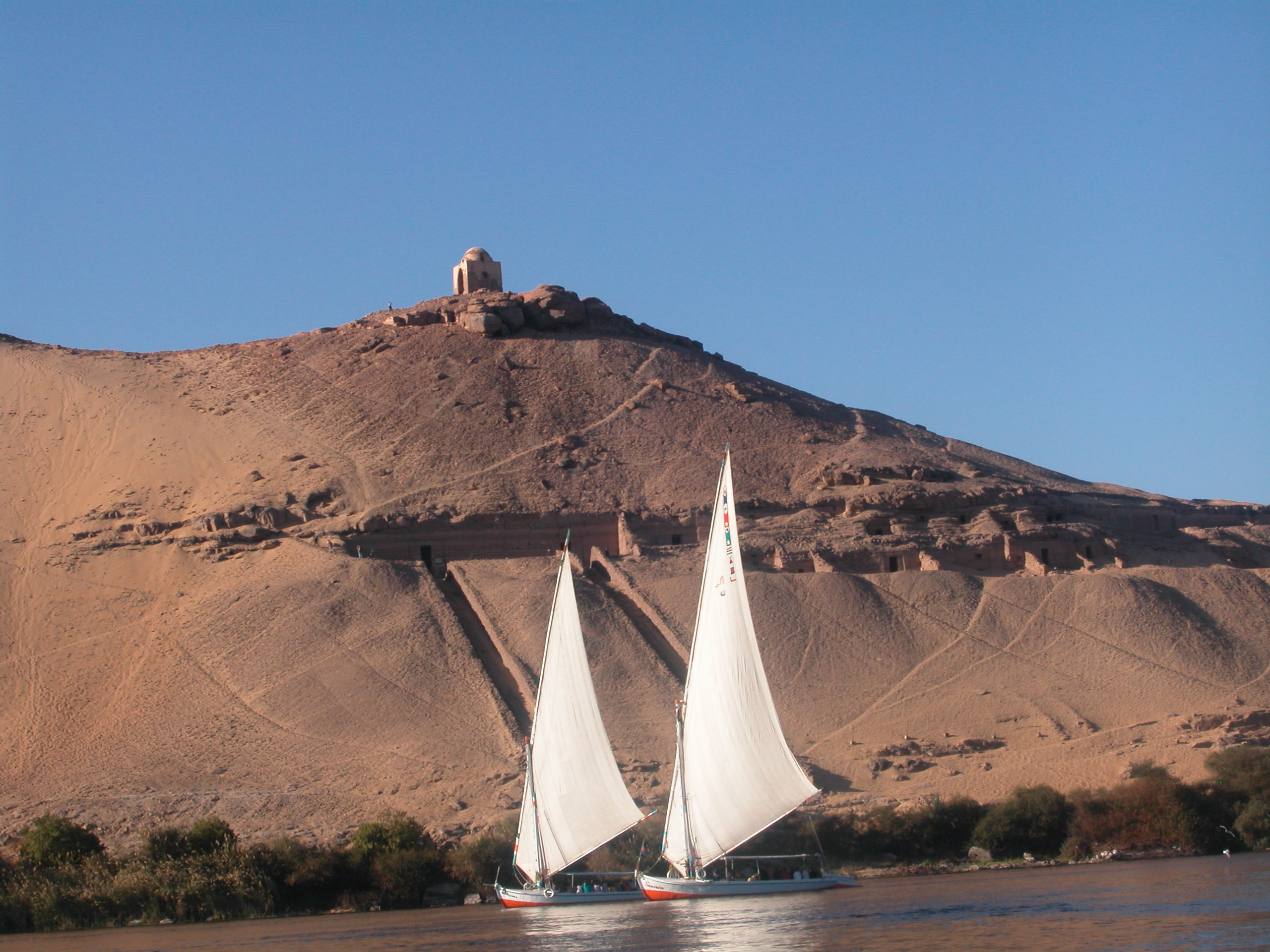 Zwei Felucken auf dem Nil bei Assuan